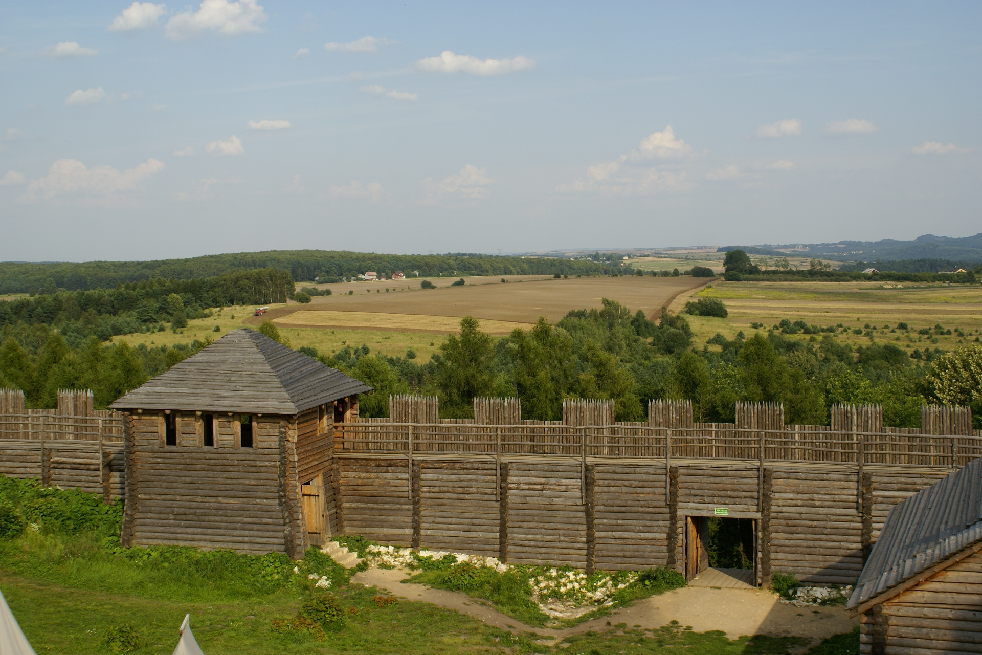 Góra Birów w Podzamczu